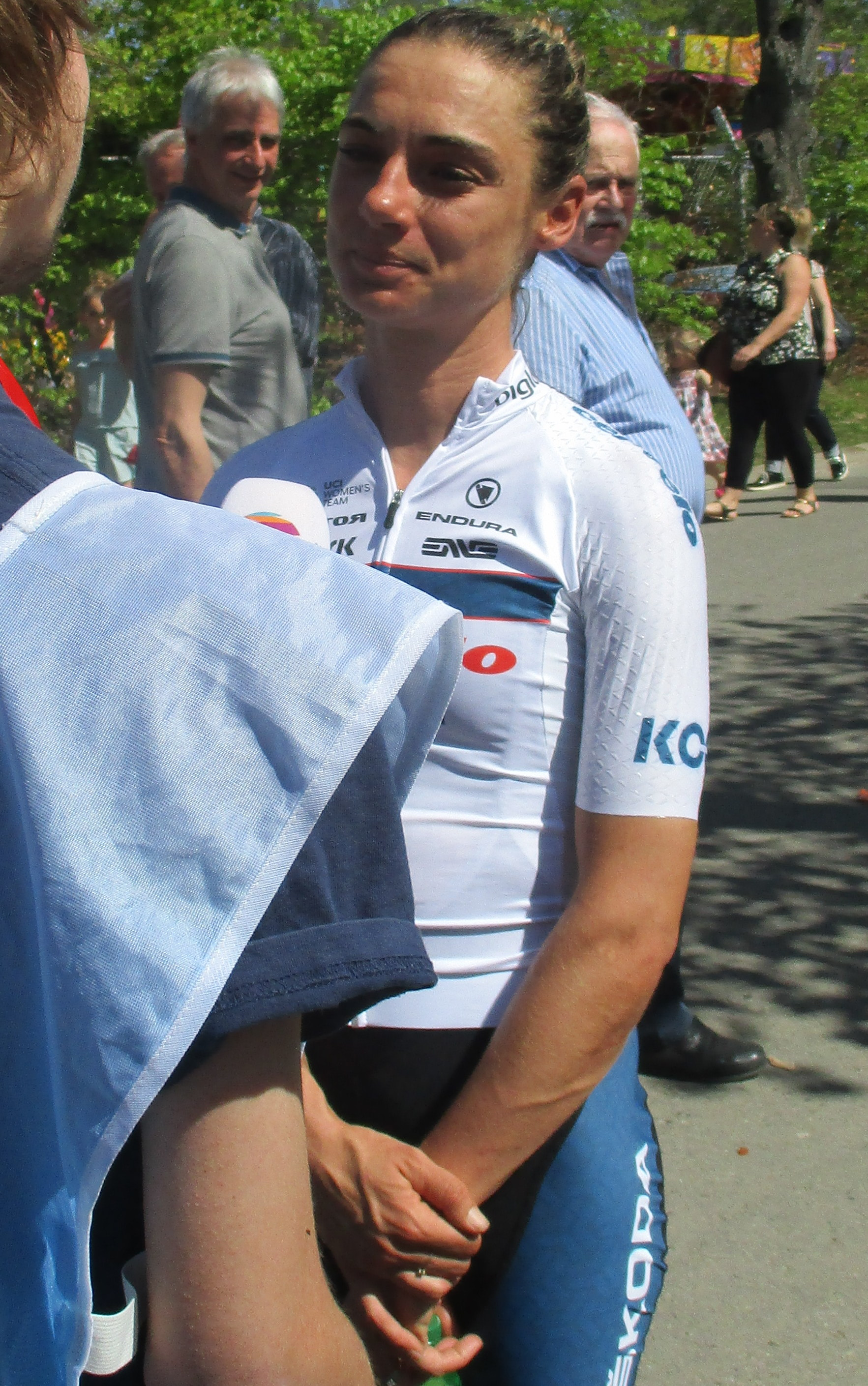 Na de finish van de Waalse Pijl 2018 op de Mur van Huy.